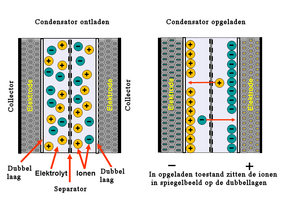 Prinzipdarstellung der Ladungsverteilung in einem Doppelschichtkondensator